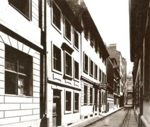 Falkoniergasse anno